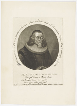 Joachim Salemann (der Ältere), Respondent in Wittenberg; aus Reval, Estland; 1693 Doktor d. Theologie in Upsala; Vater von Salemann, Joachim (-1710)